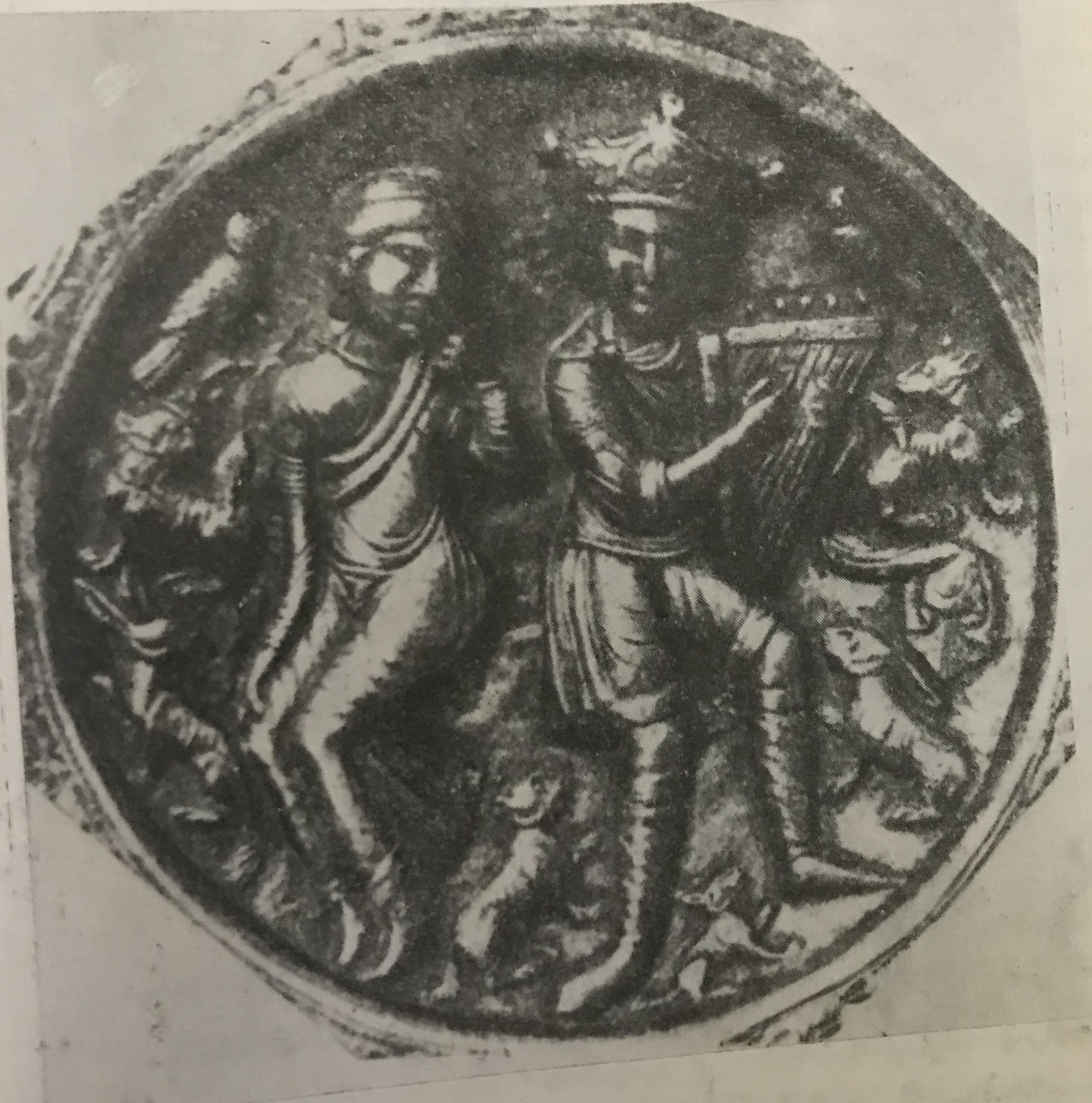 տավիղ արծաթե գավաթի վրա